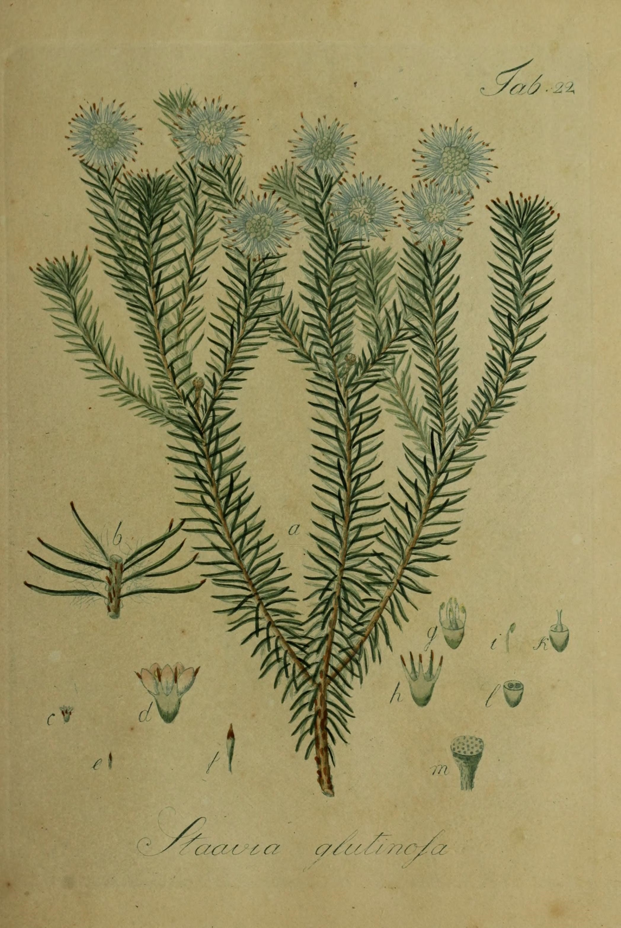 Collectio plantarum tam exoticarum, quam indigenarum, cum delineatione, descriptione culturaque earum /